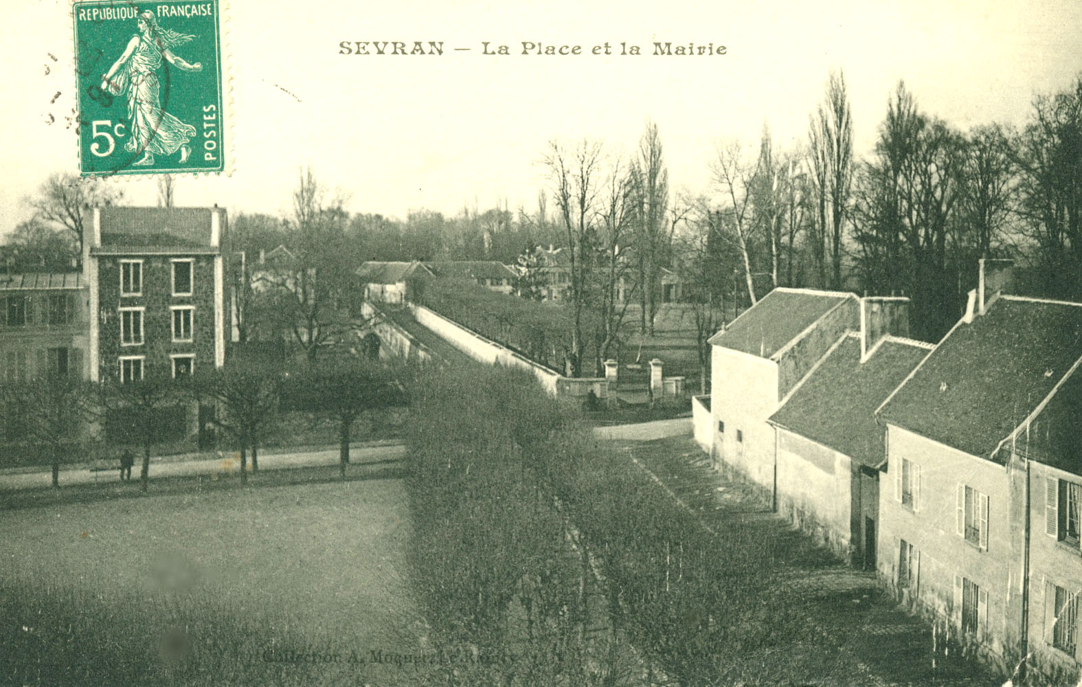 La place de Sevran au début du XXème siècle